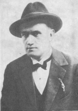 Photo de l'écrivain letton Aleksandrs Čaks - portrait de trois quarts, portant un chapeau. Auteur inconnu. 1925.